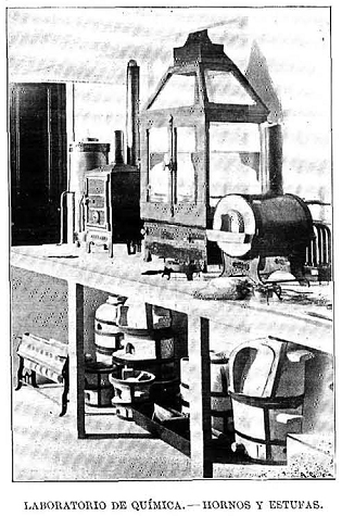 Laboratorio de química, hornos y estufas, en el Laboratorio de Material de Ingenieros, en la revista La Ilustración Española y Americana.